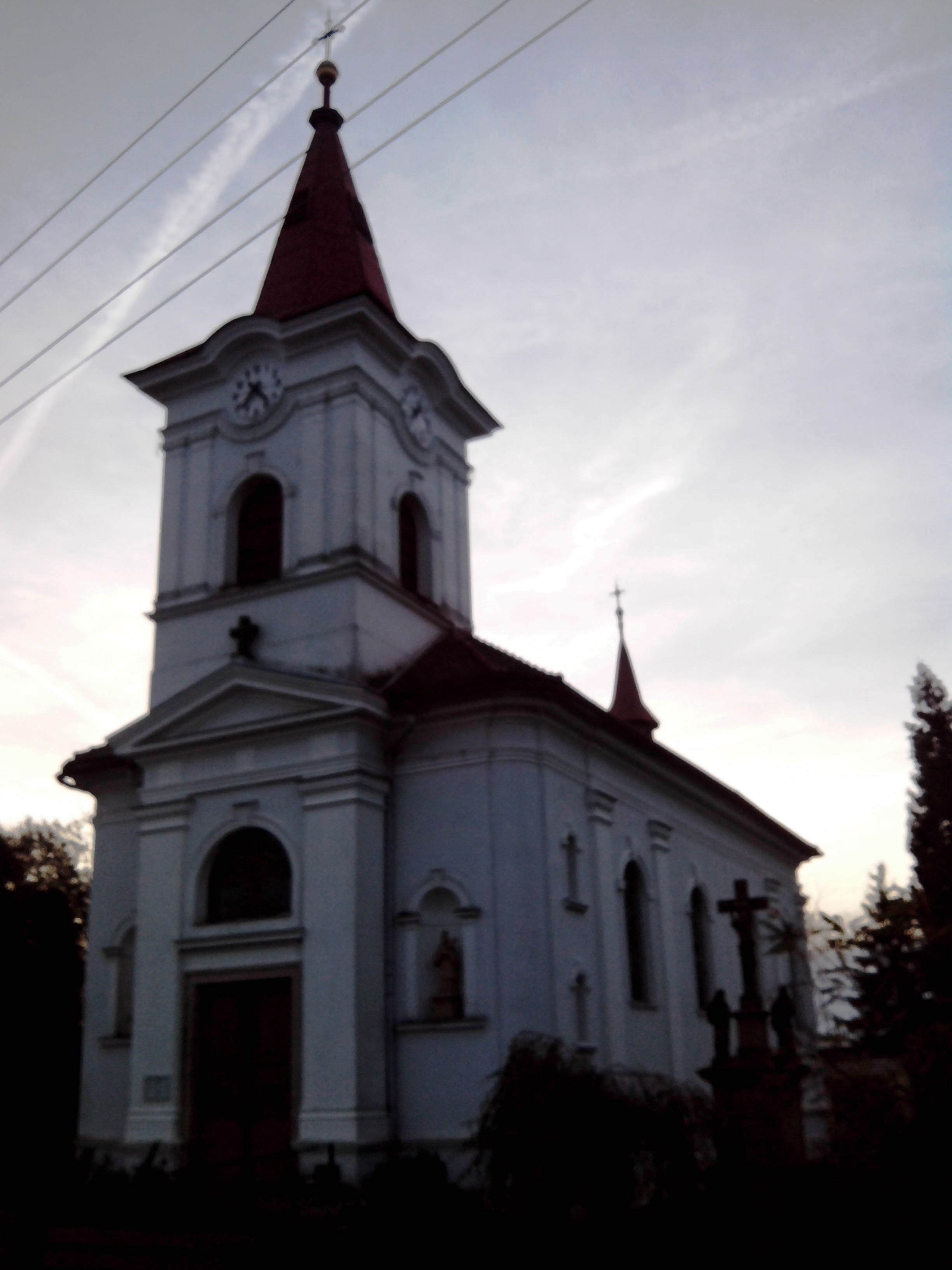 Church of Saint John the Baptist (Pohoří)